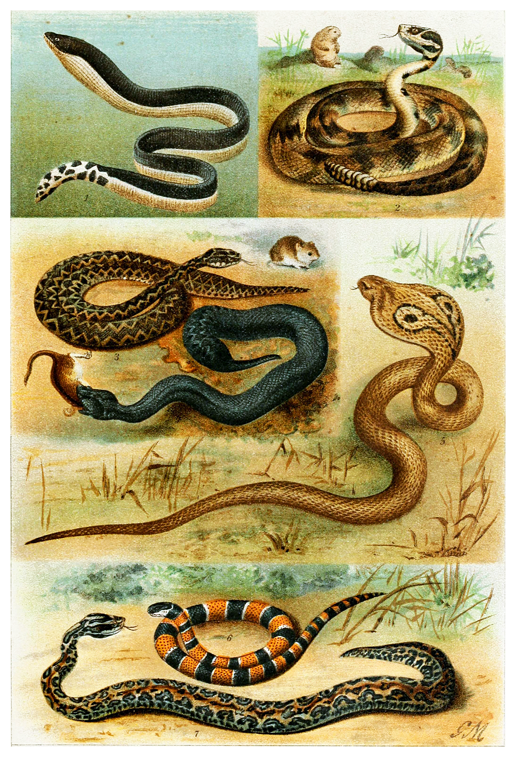 Serpentes